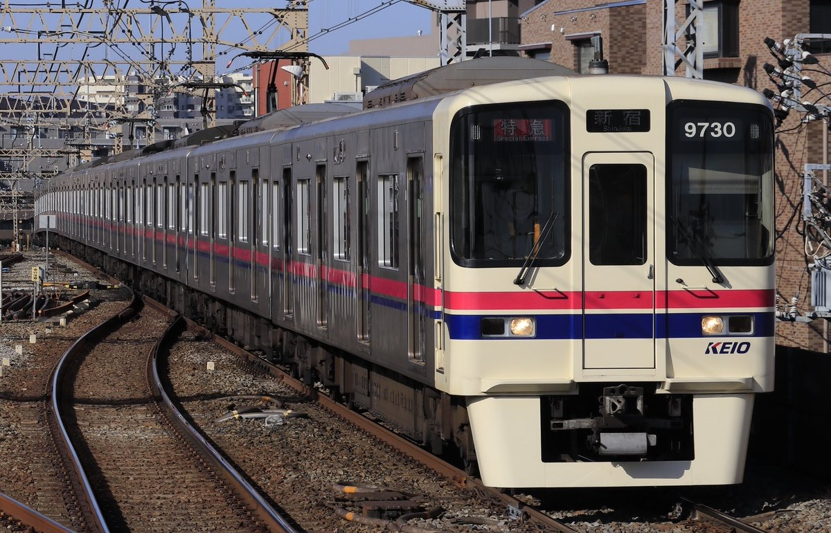 京王9000系9730F 準特急新宿行き 京王線八幡山駅